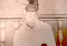 羽田野敬雄（1798-1882）